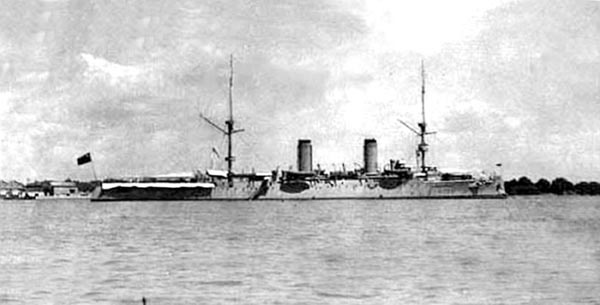 Крейсер "Хай-Чи" на Янцзы. Фото